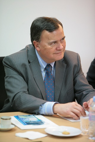 Patrice Martin-Lalande, député français.